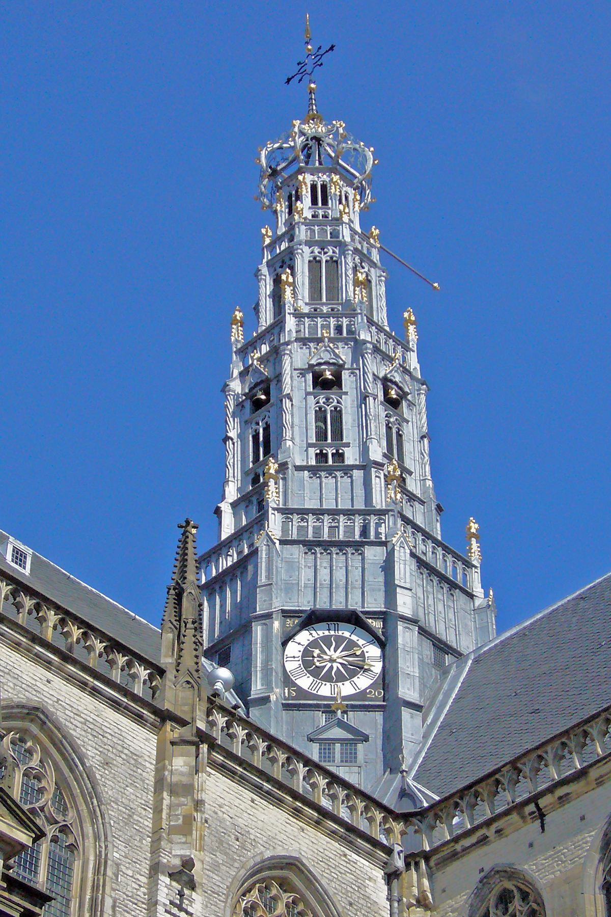 vieringtoren van sint bavo te haarlem